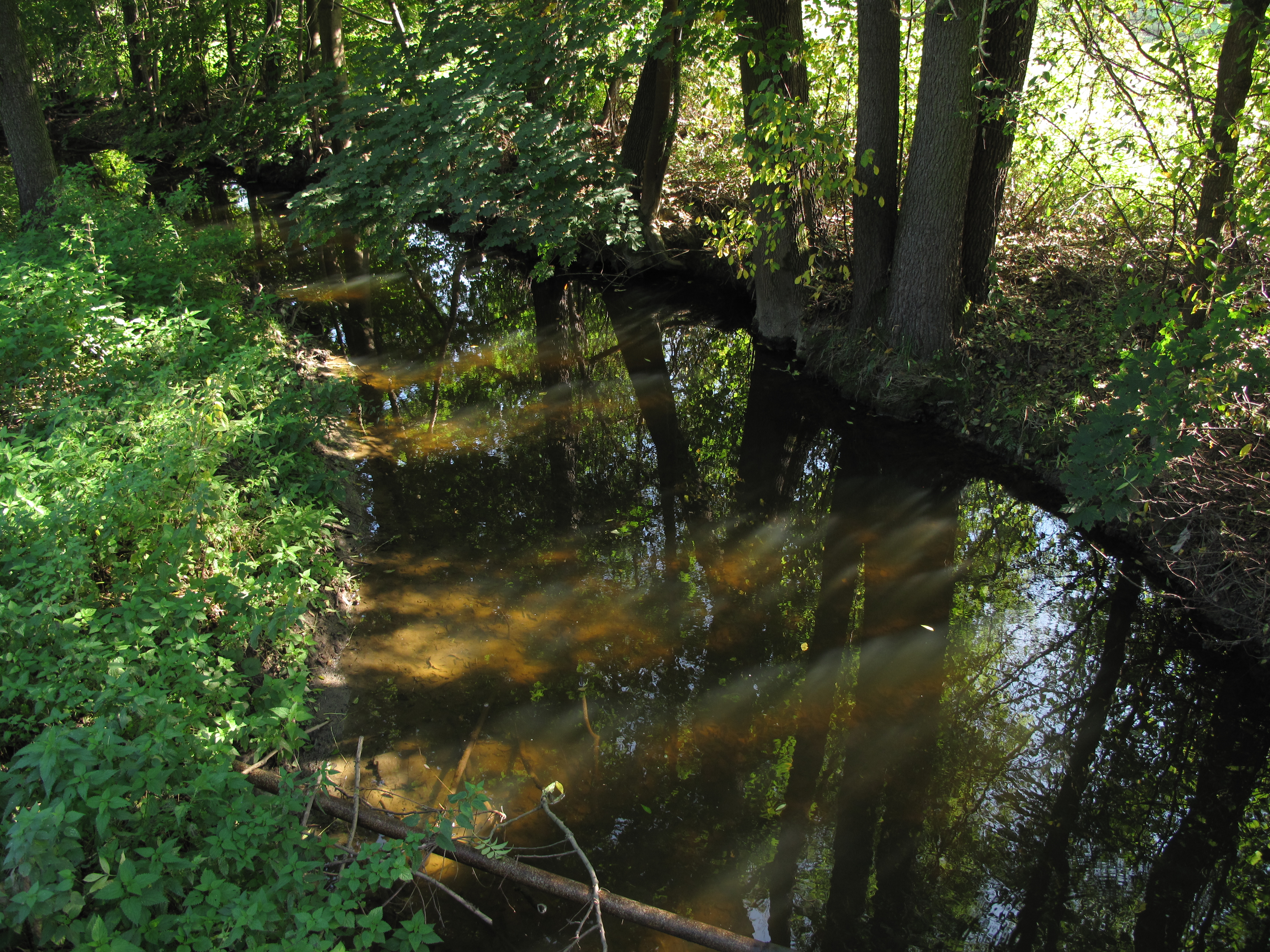 Potok v Soběšovicích. Okres Benešov, Česká republika.